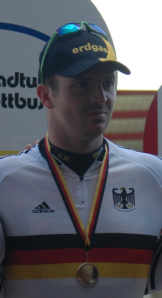 Carsten Bergemann, Bahnrad-DM 2006 in Cottbus